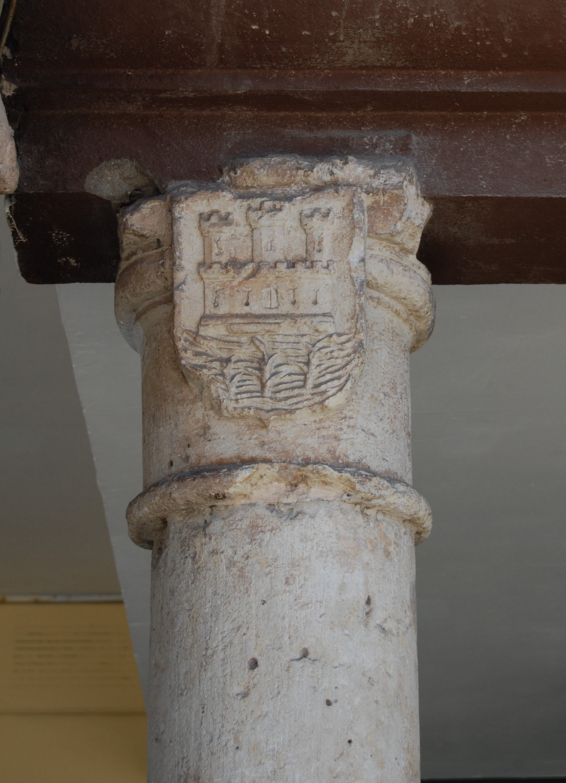 Columna de piedra que en su capitel presenta el escudo de armas de la ciudad de Alcalá de Henares desde 1609. Esta columna se localiza en el número 17 de la Plaza de Cervantes, donde estuvo anteriormente ubicado el Ayuntamiento de Alcalá de Henares.